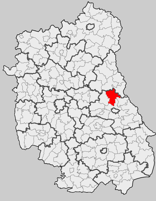 Map of gmina Sawin, Chełm county, Lublin voivodship Mapa gminy Sawin, powiat chełmski, województwo lubelskie